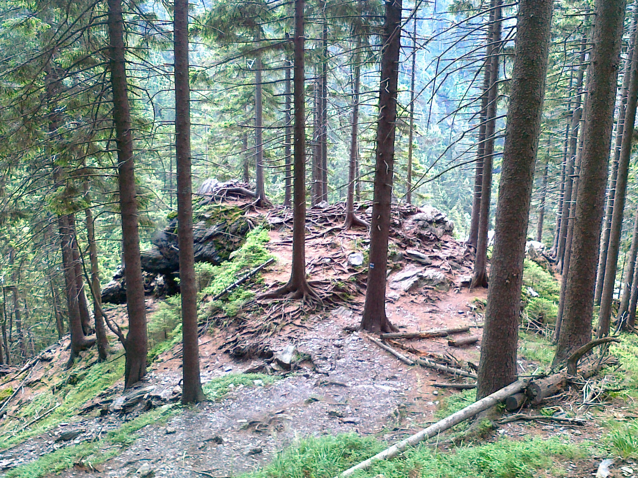 Skalisko Sokolí skála (2) - 1064 m n.p.m.